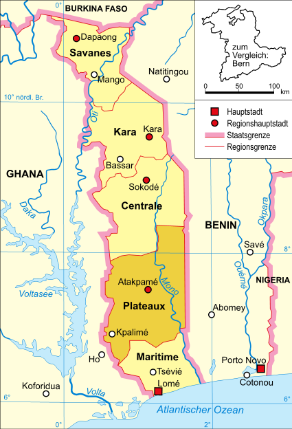 Politische Karte Togos (Region Plateaux hervorgehoben)